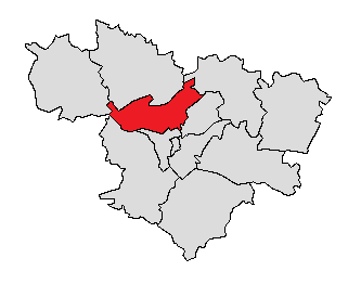 Localisation du canton d'Agen-Nord